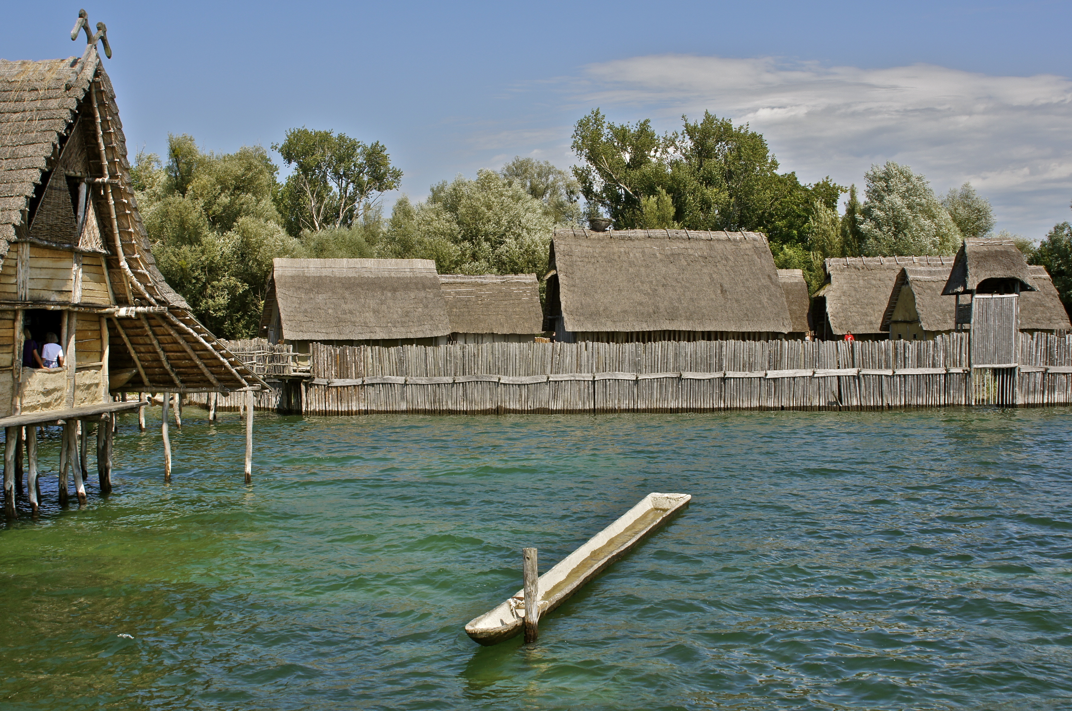 Die Pfahlbausiedlung Unteruhldingen ist ein archäologisches Freilichtmuseum. Es liegt am und im Bodensee in Baden-Württemberg. Die ersten Bauten wurde bereits 1922 unter wissenschaftlicher Leitung errichtet. Heute besuchen bis zu einer Viertelmillionen Menschen jährlich die Anlage. Das Museum besteht im wesentlichen aus den folgenden Teilbereichen: 1) Steinzeithäuser (Riedschachen). 2) Steinzeitliche Dorf (Sipplingen). 3) bronzezeitlichem Dorf (Buchau). 4) Hornstaad Haus und Arbon Haus. Das Hornstaadhaus wurde 1996 in Zusammenarbeit mit der Fernsehsendung 'Sendung mit der Maus' errichtet. Die gesamte Anlage gehört zum Weltkulturerbe